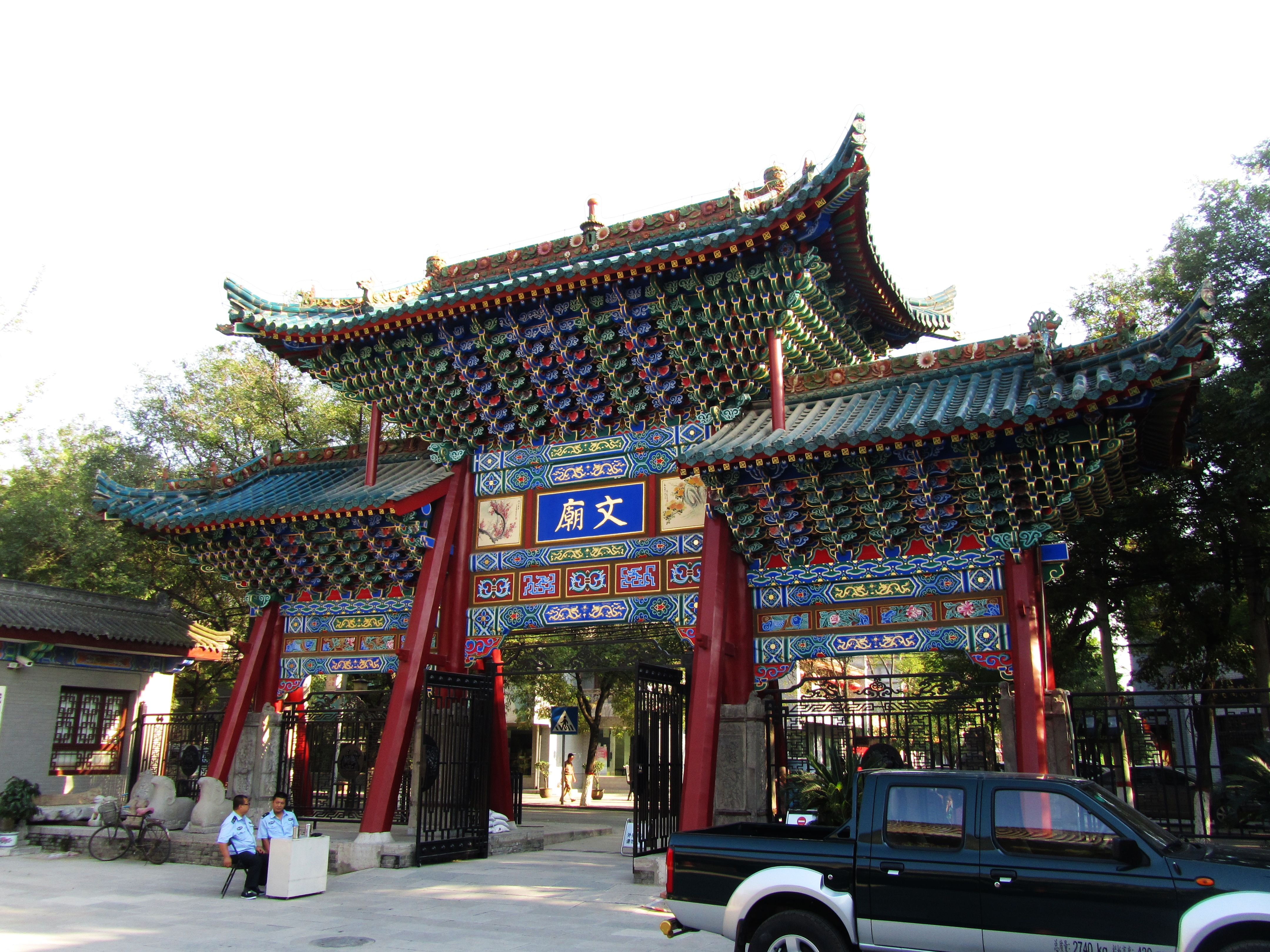 咸阳文庙牌楼内侧，今咸阳博物馆大门。